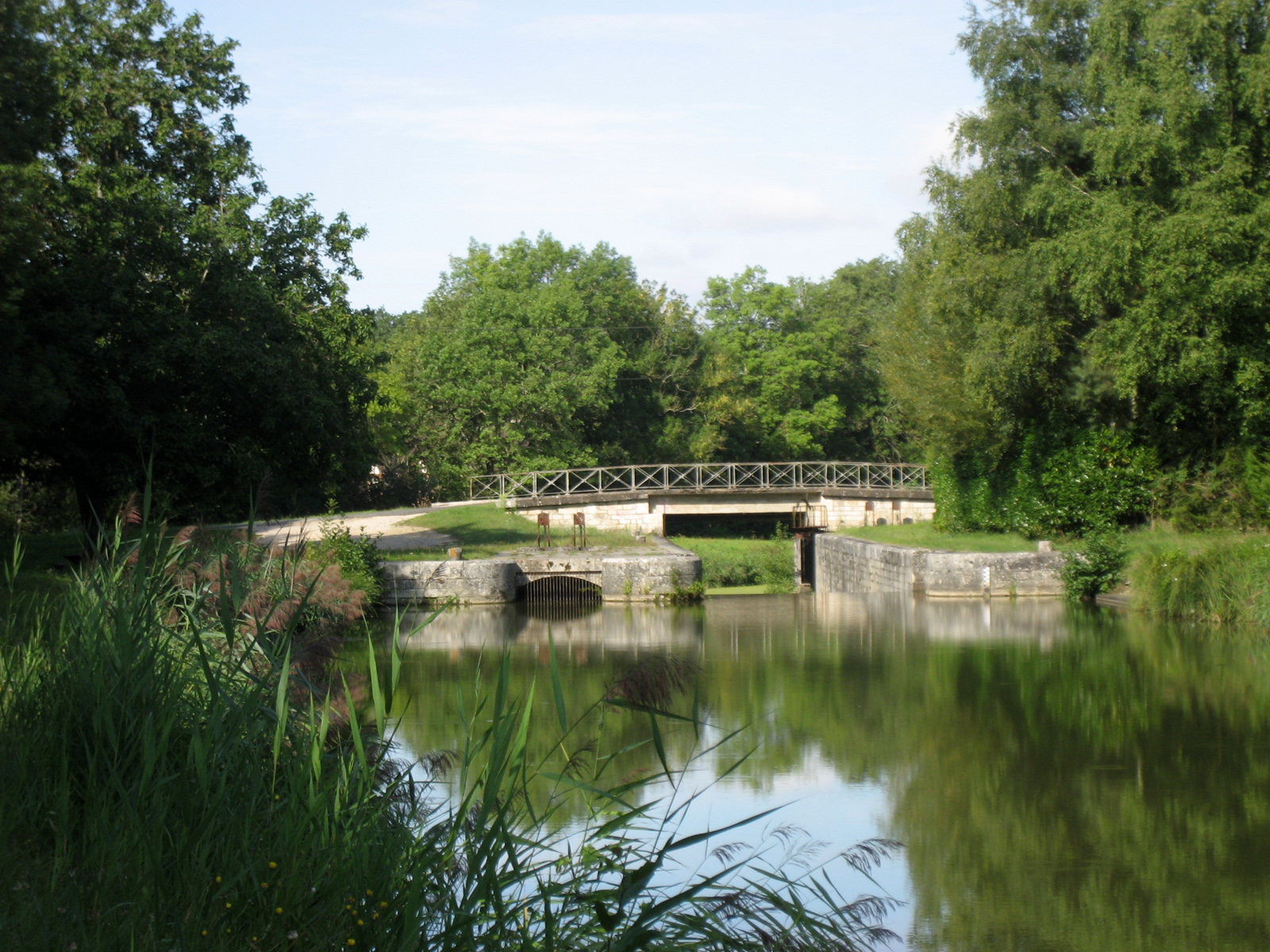 Canal d'Orléans , écluse du Gué Girault. Vitry-aux-Loges , département du Loiret, France.